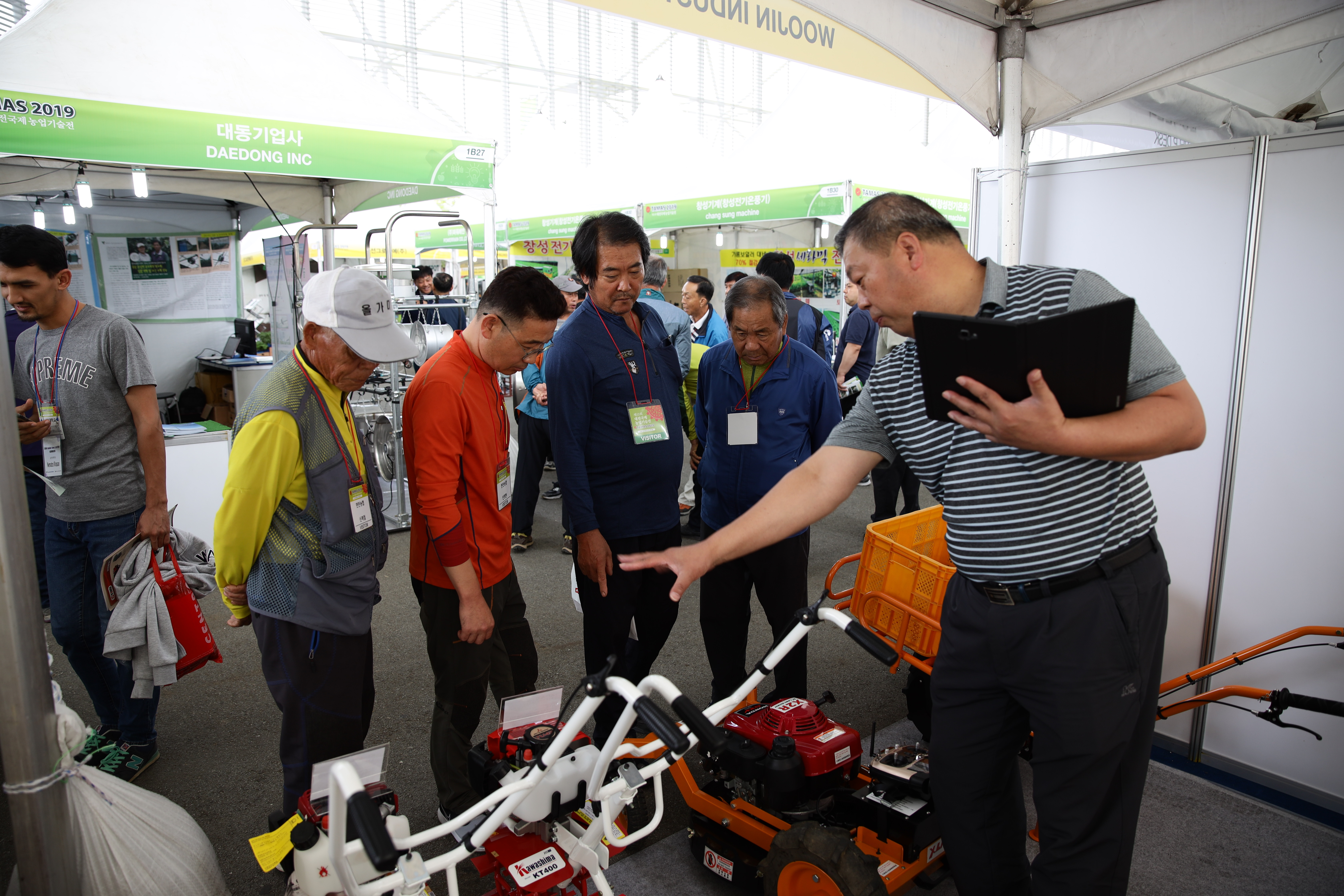 2019 대전국제농업기술전 행사장 부스